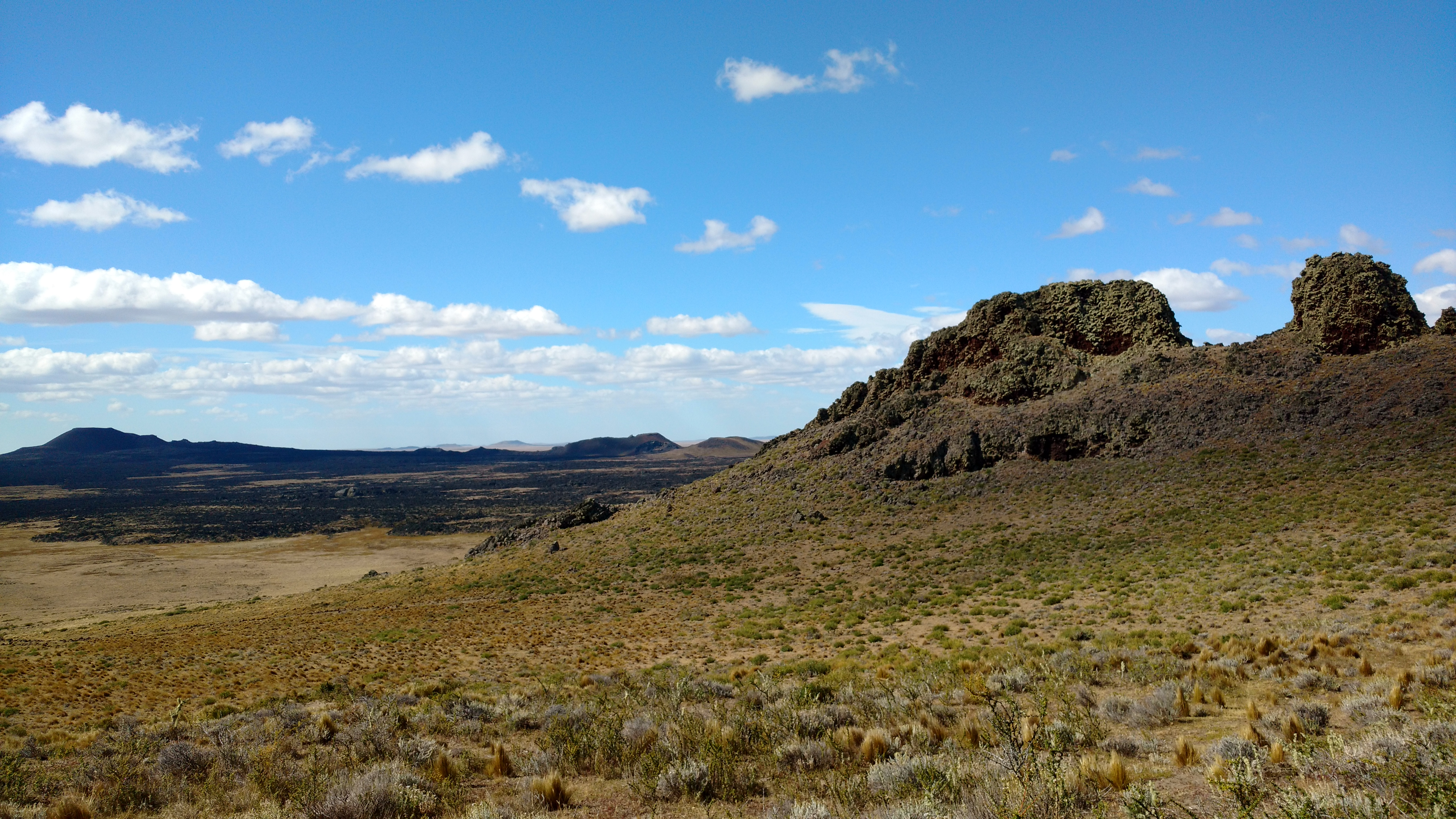 Parque Nacional Pali Aike, Región de Magallanes y Antártica Chilena, Chile